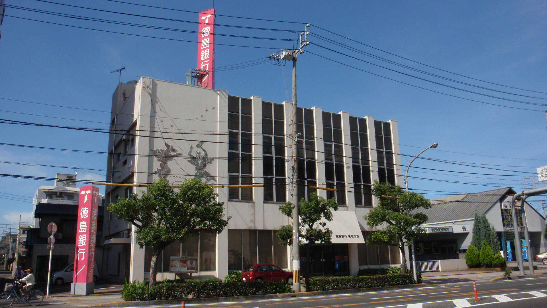 香川県高松市観光通二丁目5番25号にある徳島銀行高松支店。 沿革 1951年（昭和26年）7月20日 - 徳島無尽高松支店として高松市北亀井町17番地1に開設。 1951年（昭和26年）10月20日 - 組織変更により徳島相互銀行高松支店となる。 1958年（昭和33年）7月11日 - 戦災復興土地区画整理（第一工区一次）事業により高松市鍛冶屋町7番地5に所在地名変更。 1973年（昭和48年）12月10日 - 現在地に新築移転。 1989年（平成元年）2月1日 - 組織変更により徳島銀行高松支店となる。 2014年（平成26年）8月4日 - 丸亀支店がブランチインブランチとして当支店内に移転。 （典拠：『徳島銀行八十年史』80年史編纂委員会編、株式会社徳島銀行、1998年）